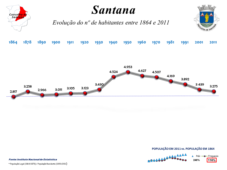 Evolução da População